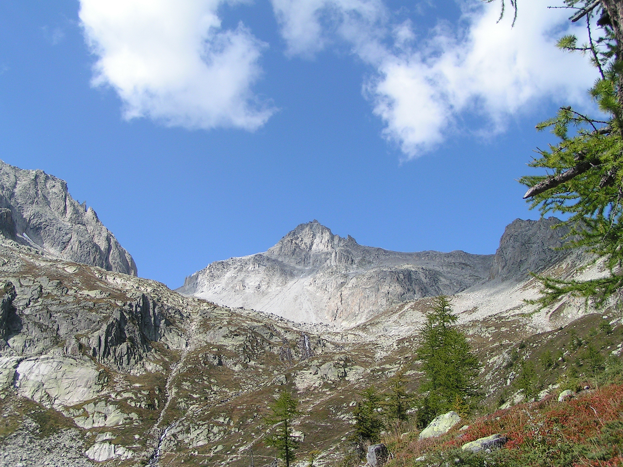 Chüebodenhorn 3070 Val Bedretto